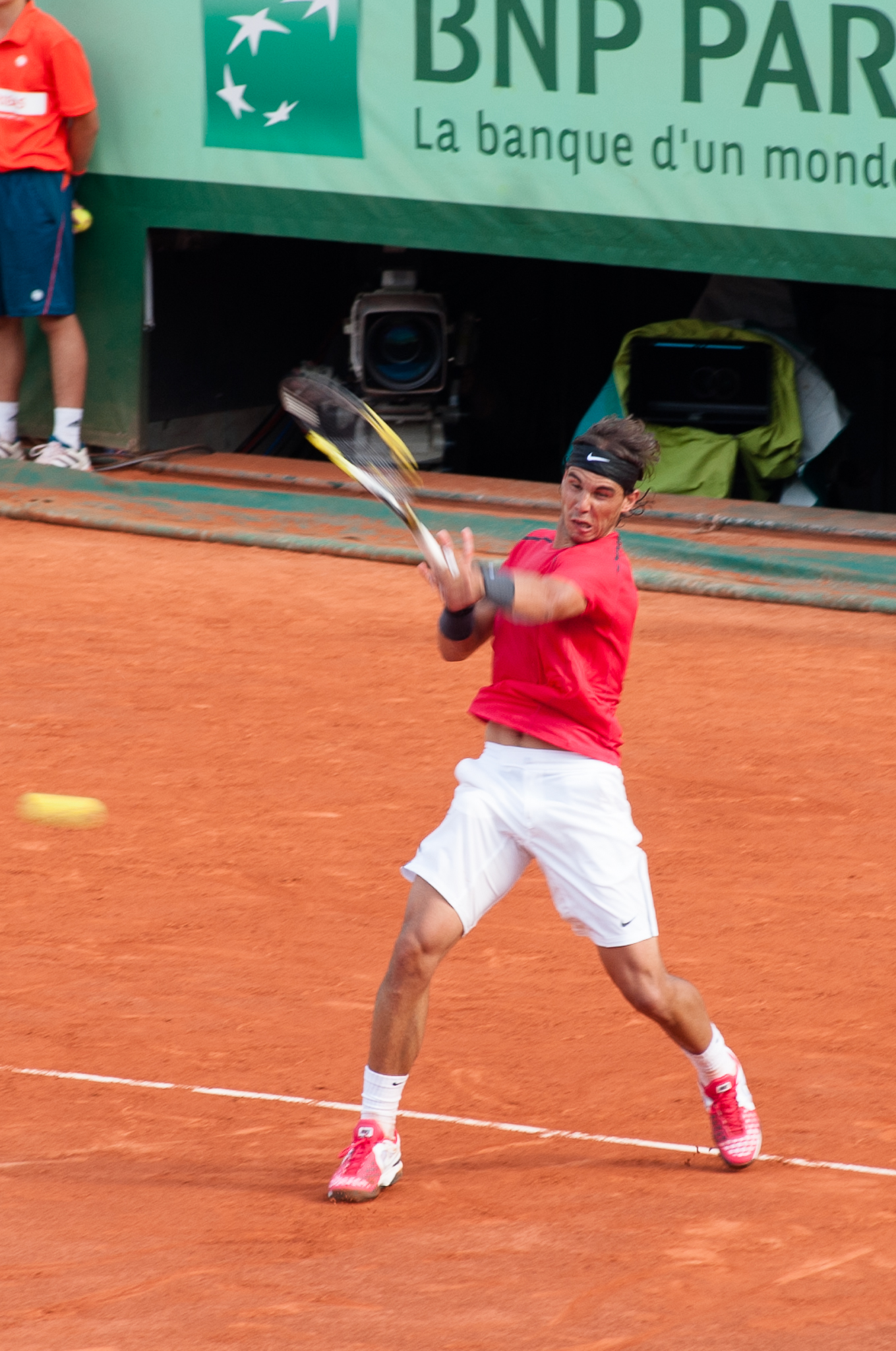 Nikon d700, Nikkor 80-200 2.8